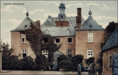 Schloss Bleijenbeek, Holland, 1908 (zerstört 1945), colorierte Postkarte, Aufnahme von 1908